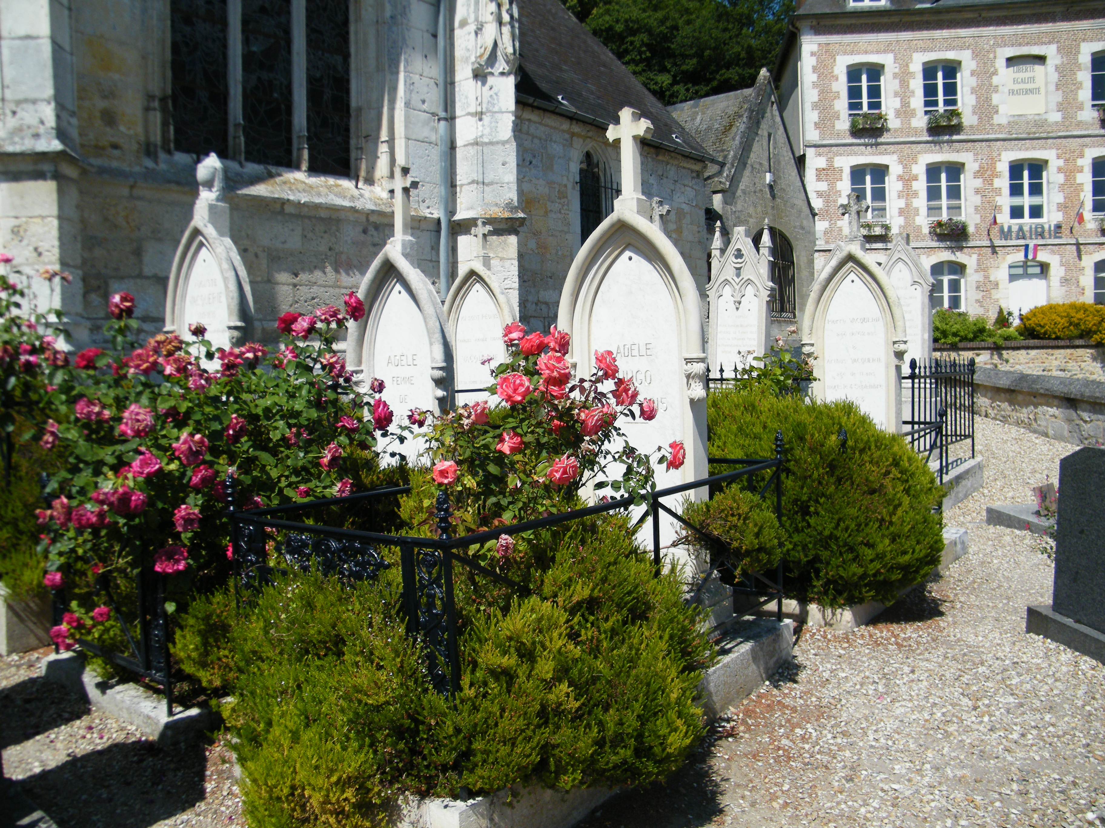 Villequier (seine-Maritime), sépultures Vacquerie-Hugo, dans le cimetière, près de l'église Saint-Martin.